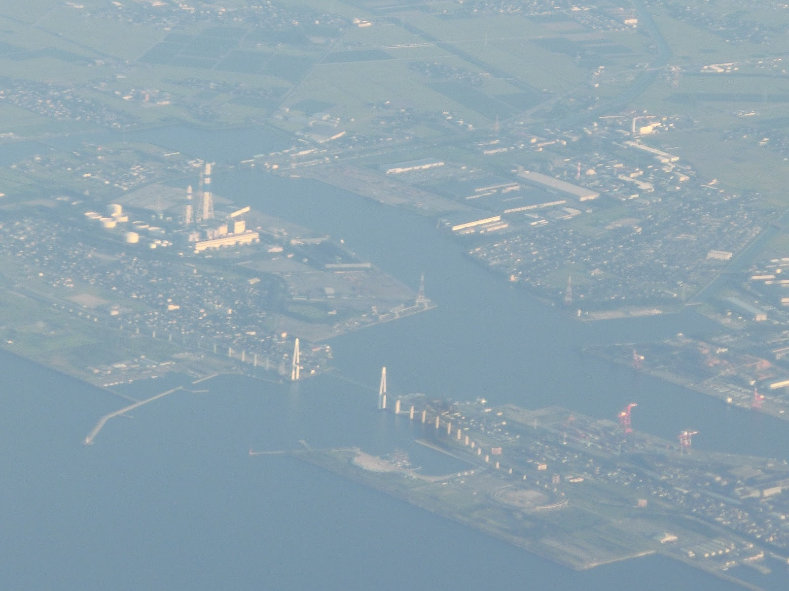 伏木富山港 新港地区（富山新港）